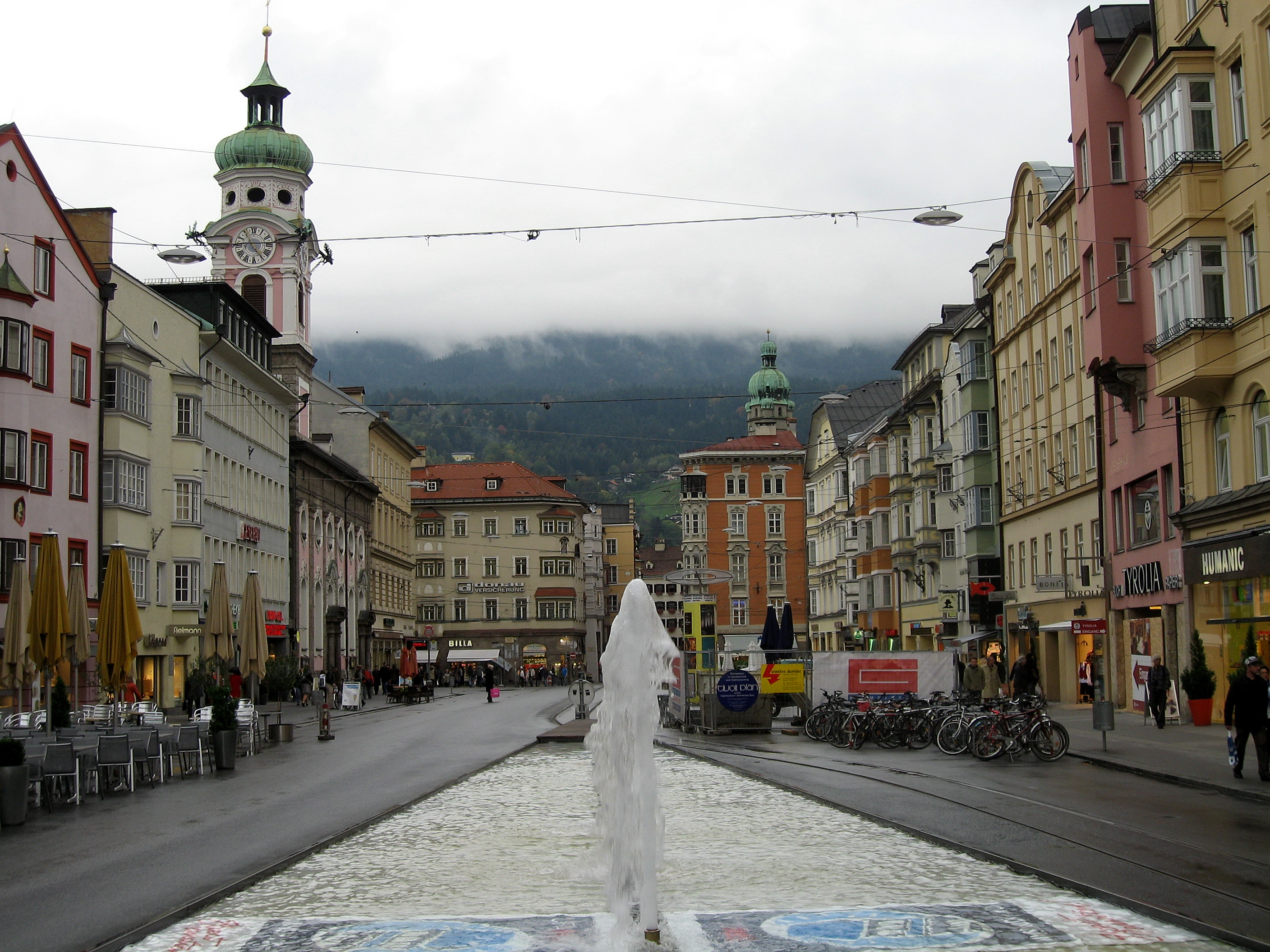 Österreich, Innsbruck, Innenstadt vor der Nordkette